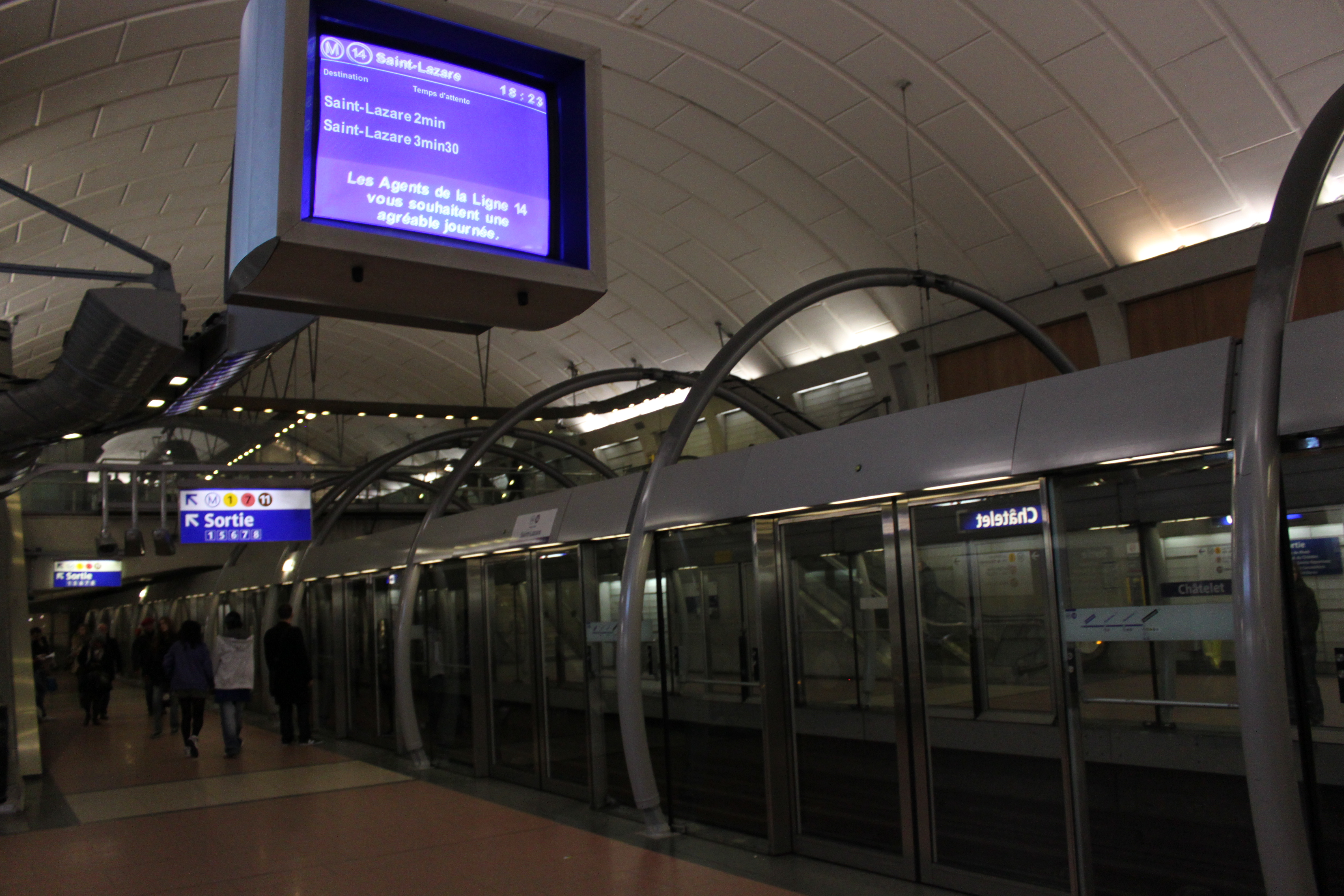 Ecran d'affichage des temps d'attente sur la ligne 14 du métro de Paris.